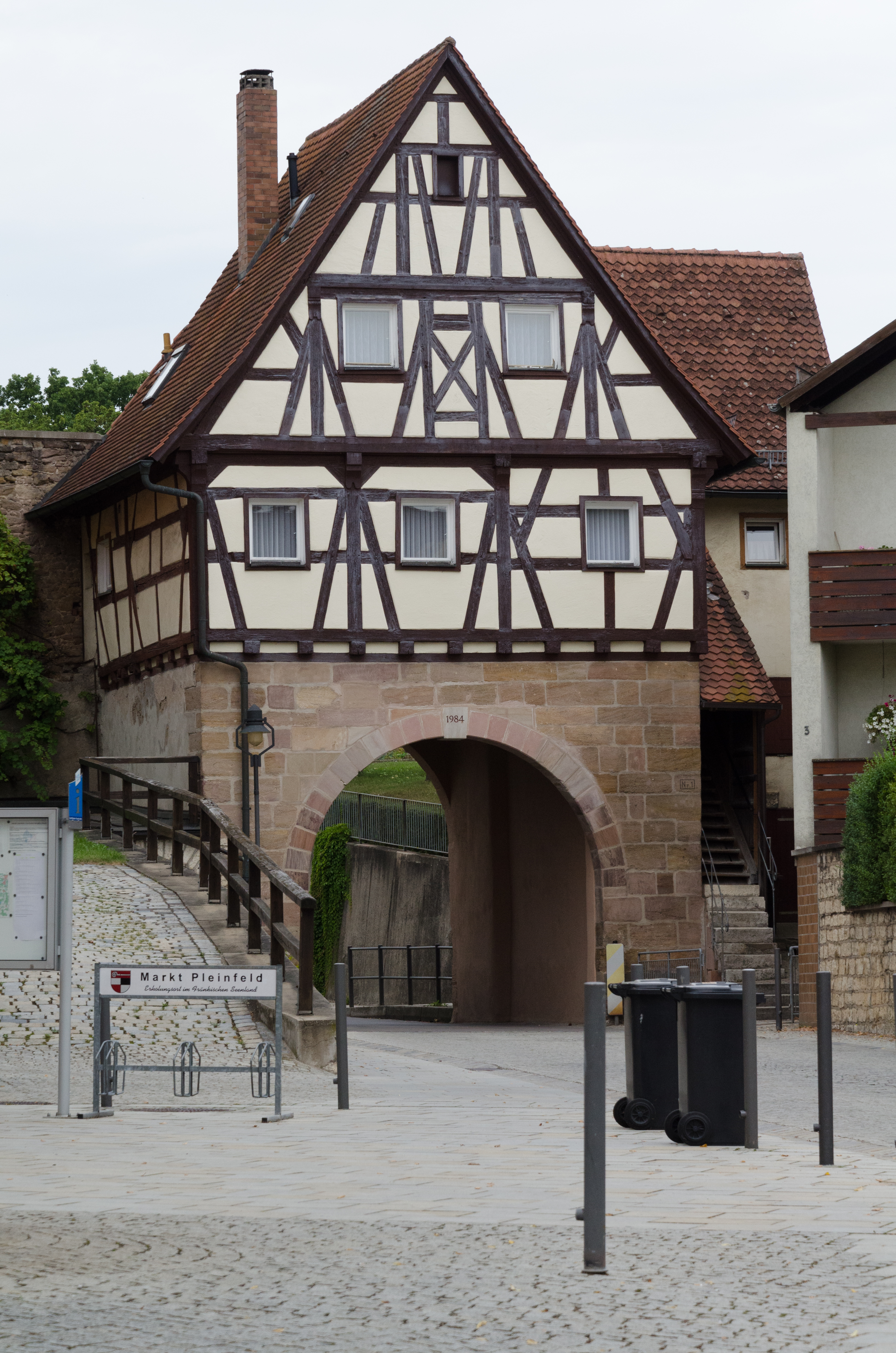 Pleinfeld, Spalter Tor, Stadtseite